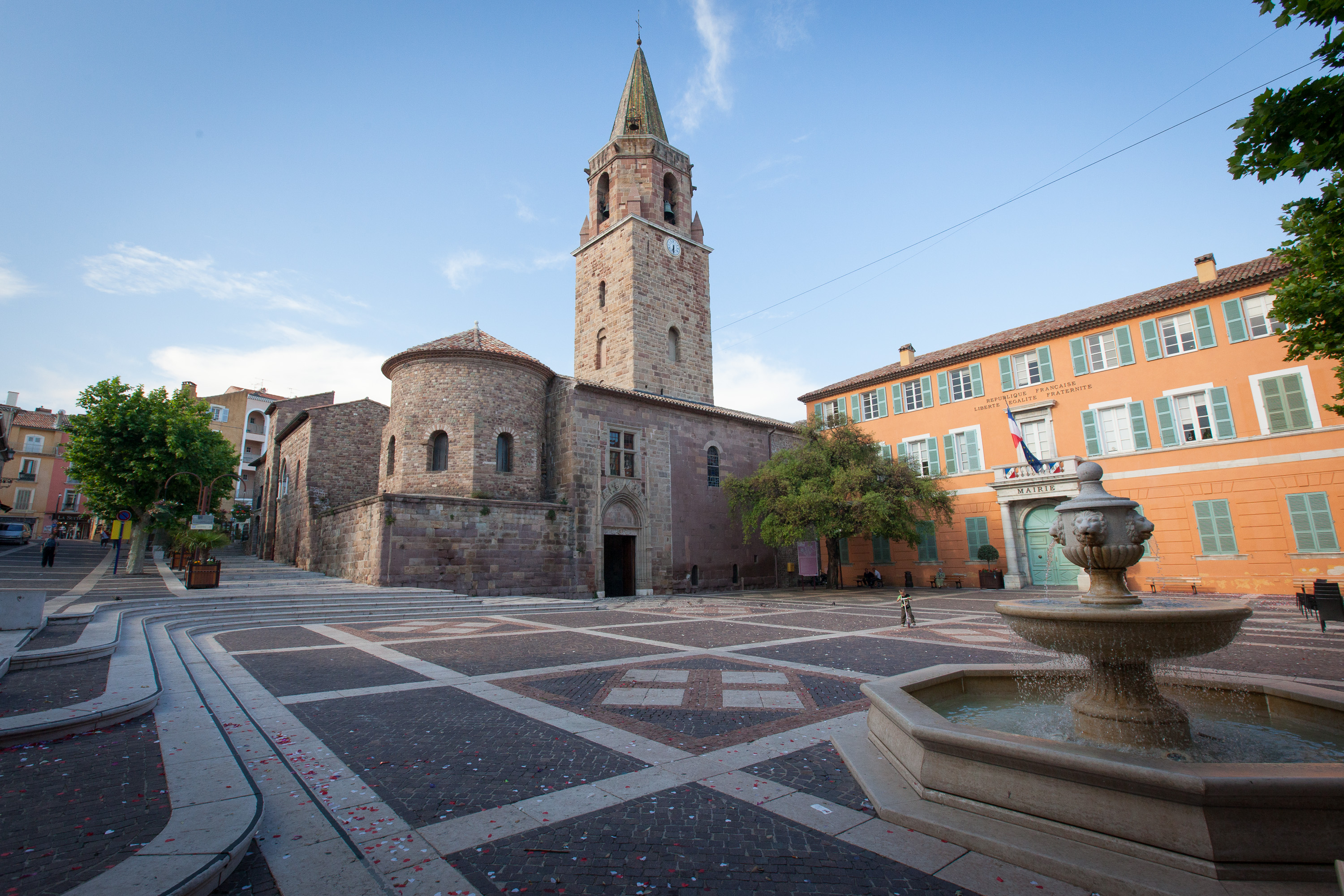 Fréjus